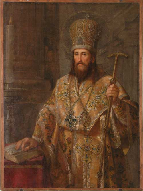 Шебуев В.К. 1777-1855 Образ святителя Димитрия Ростовского. 1825 Медная доска, масло. 130х100. Ж-510 Пост. в1924 из Ростовского Спасо-Яковлевского монастыря